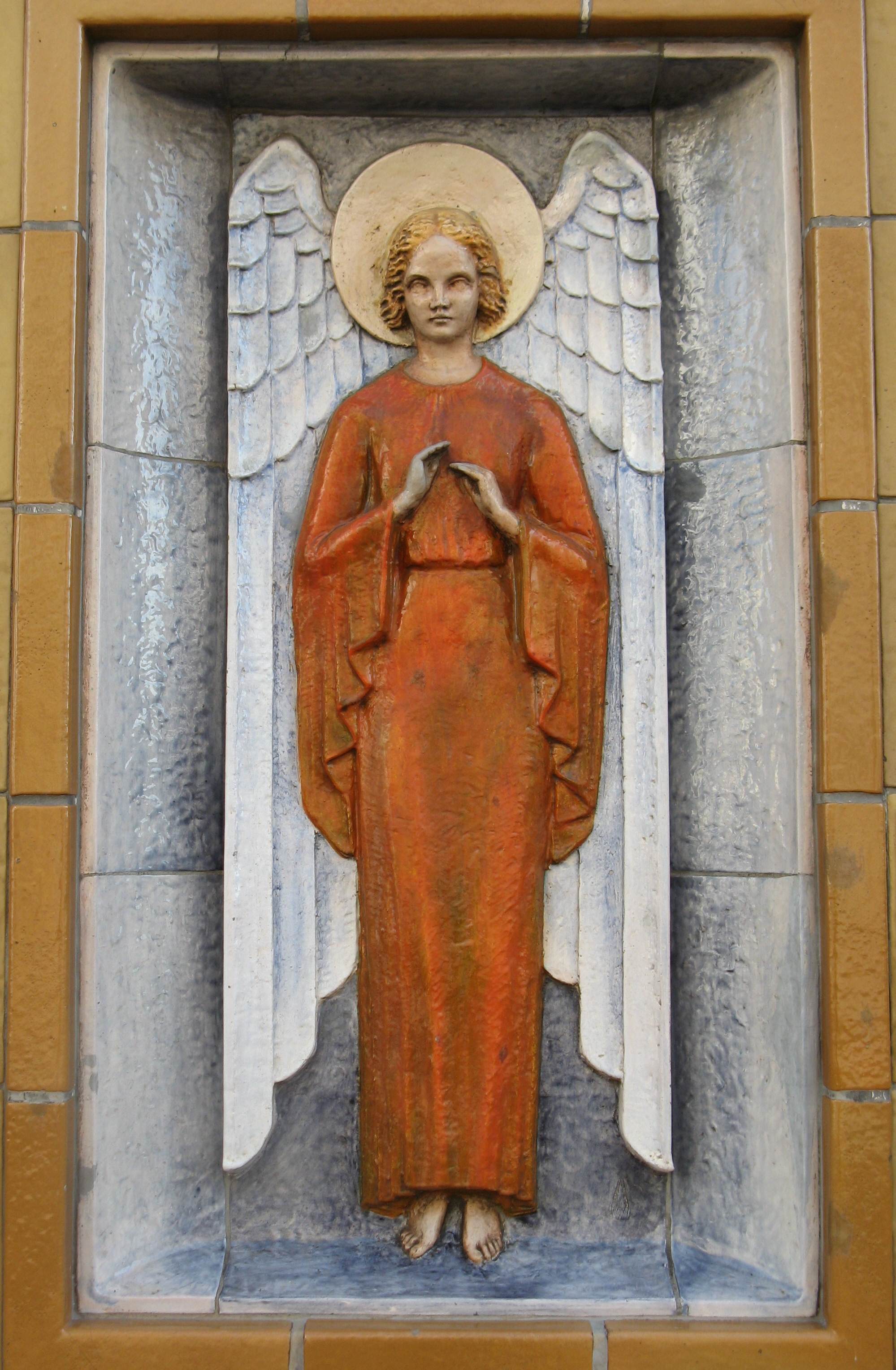 Schutzengel (um 1930), Majolikarelief, Schutzengel-Apotheke, Favoritenstraße 11, Wien-Wieden